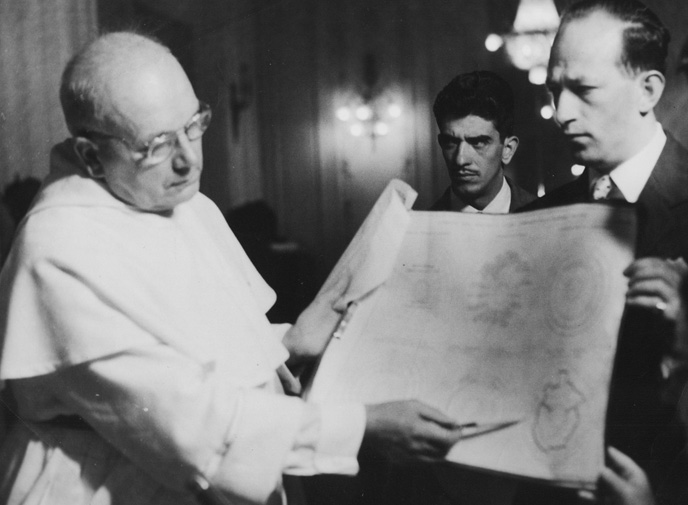 Louis-Joseph Lebret en Colombie, 1958